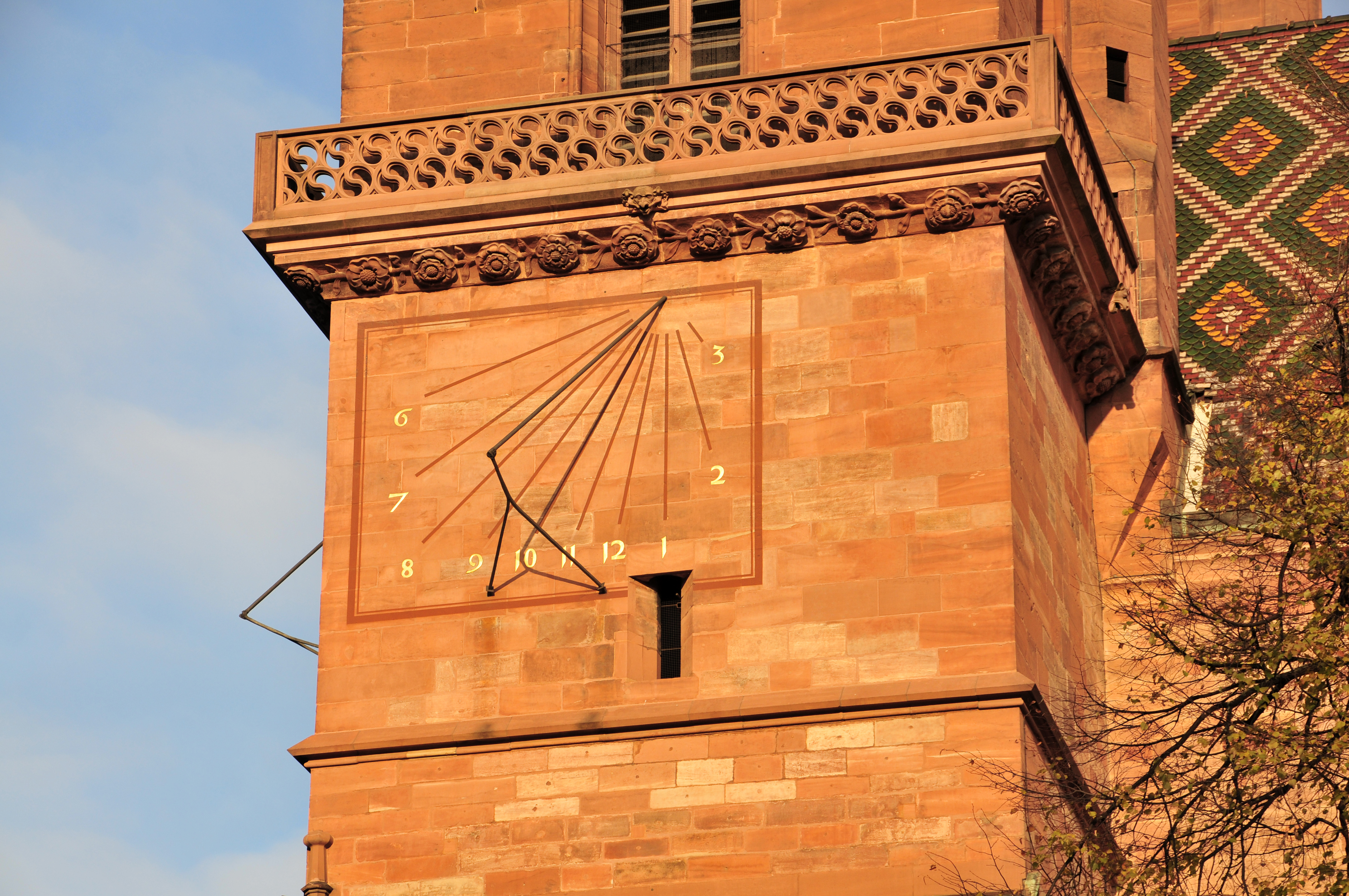 Basel